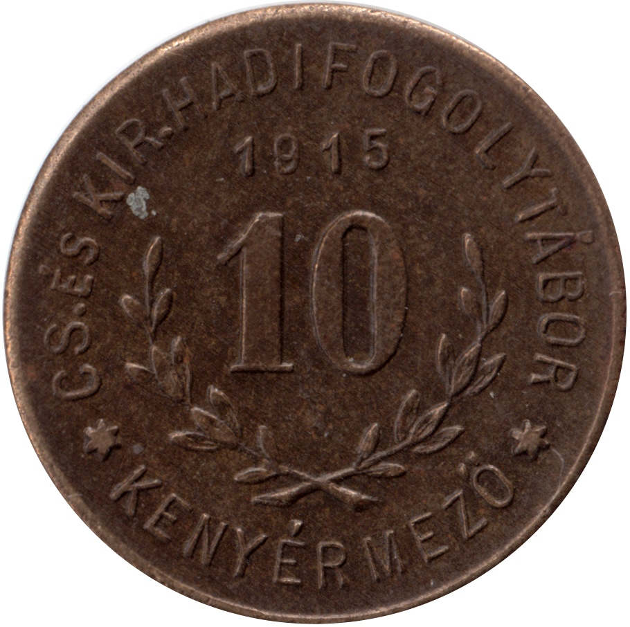 WWI Hungarian lagergeld CS. ES KIR. HADIFOGOLYTÁBOR KENYÉRMEZŐ Imperial and Royal Prison Camp Kenyérmező